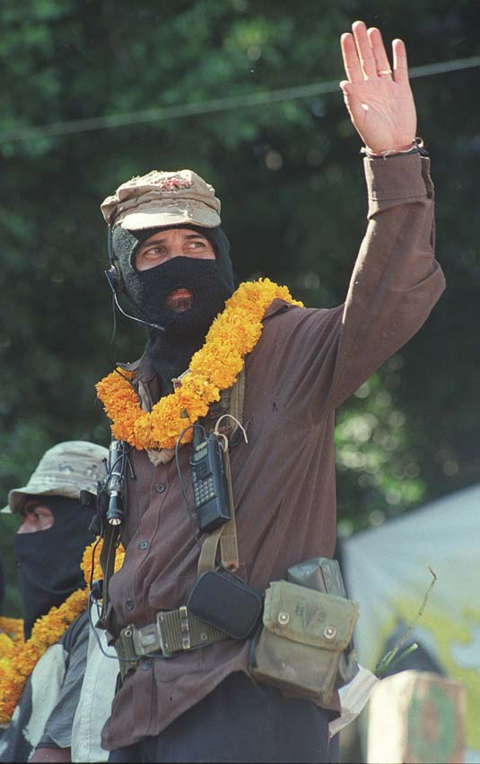 Subcomandante Marcos del EZLN durante la Marcha del Color de la Tierra. 23 comandantes del EZLN y el Subcomandante Marcos acompañados por la sociedad civil nacional e internacional recorrieron diferentes estados de México desde Chiapas al Distrito Federal .